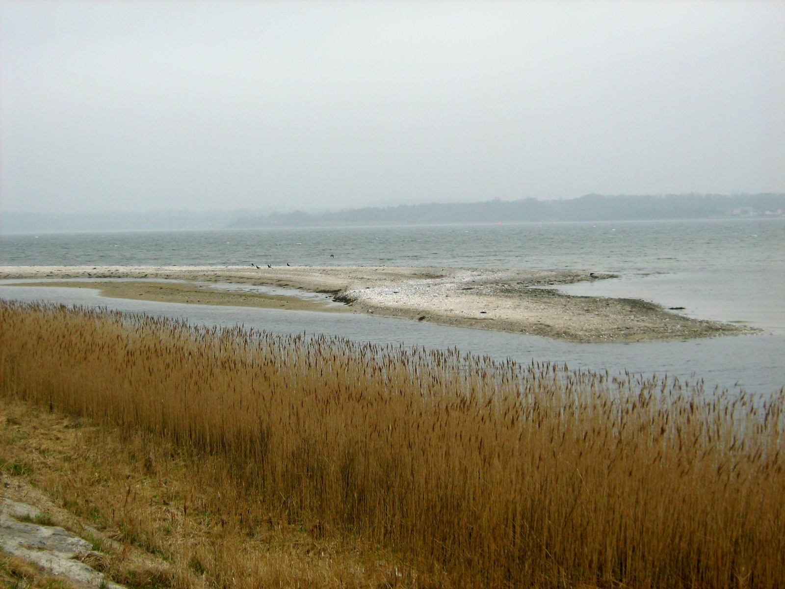 Sandbank im Naturschutzgebiet Holnis